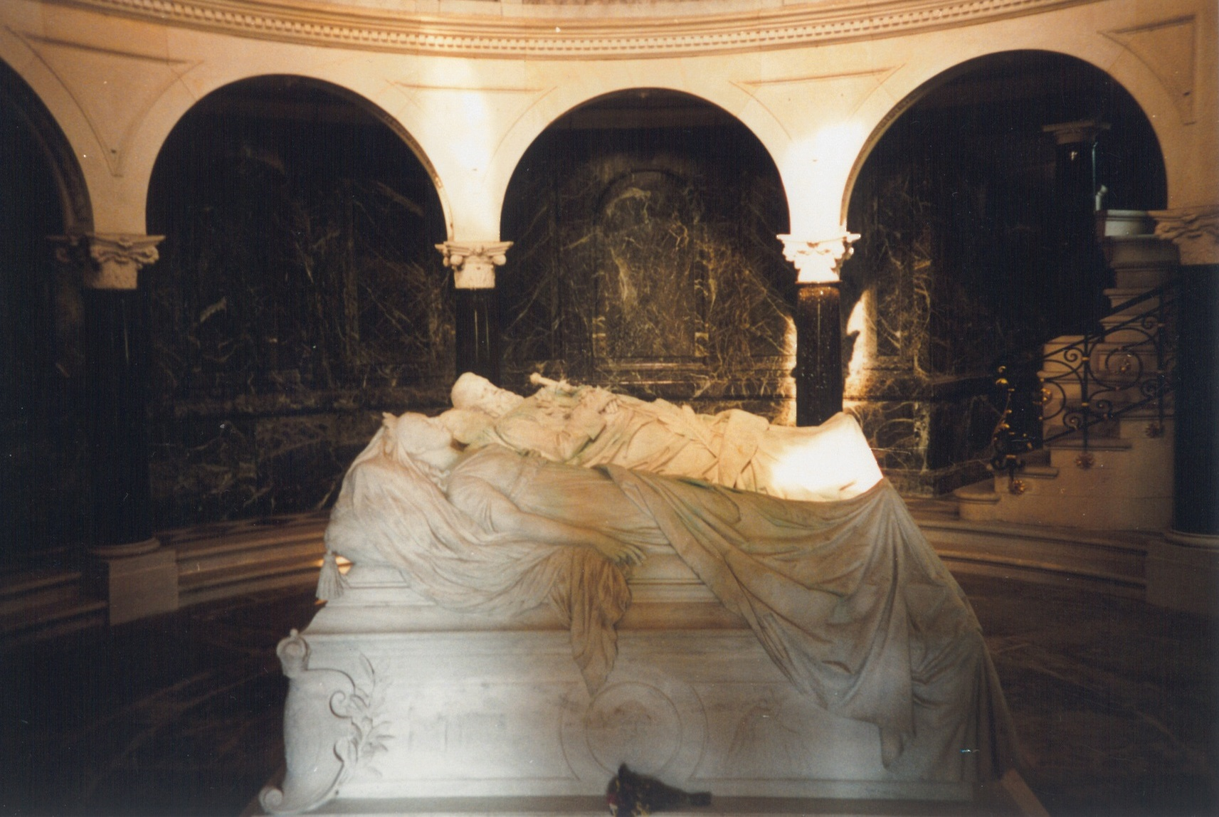 Marmorsarkophage des Kaisers Friedrich III. und der Kaiserin Victoria, Aufnahme von 1994